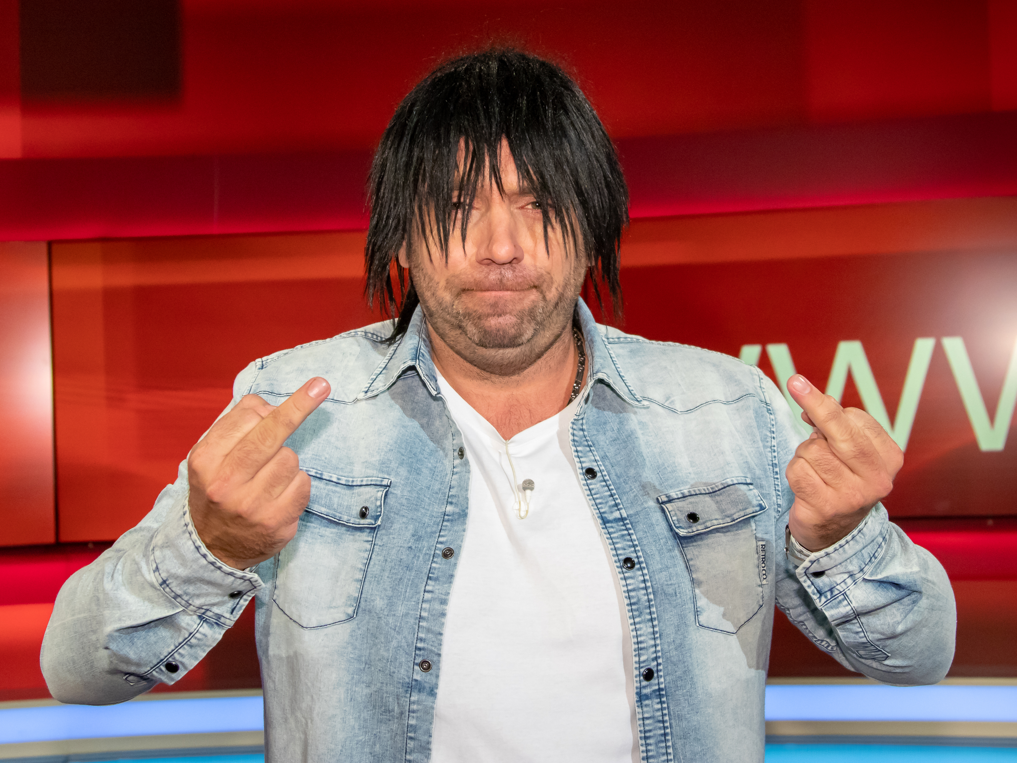 Ikke Hüftgold in der WDR-Sendung "hart aber fair" am 3.9.2018